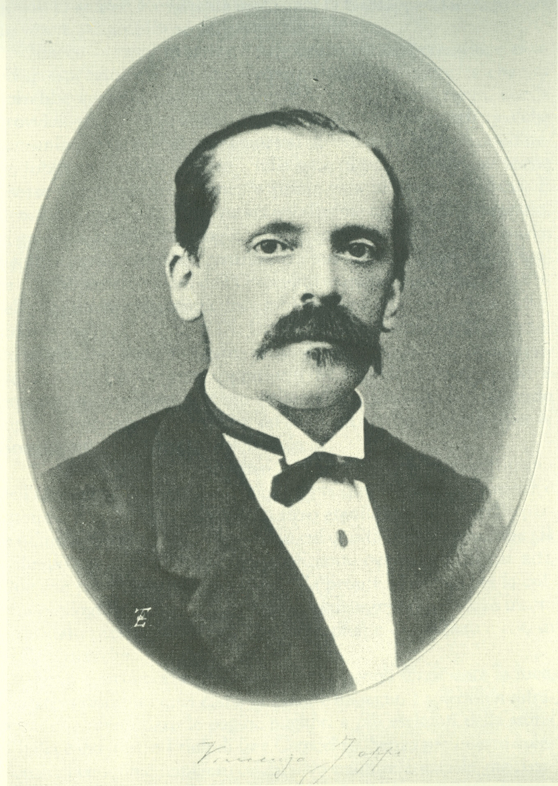 Foto di Vincenzo Joppi, Biblioteca civica di Udine.